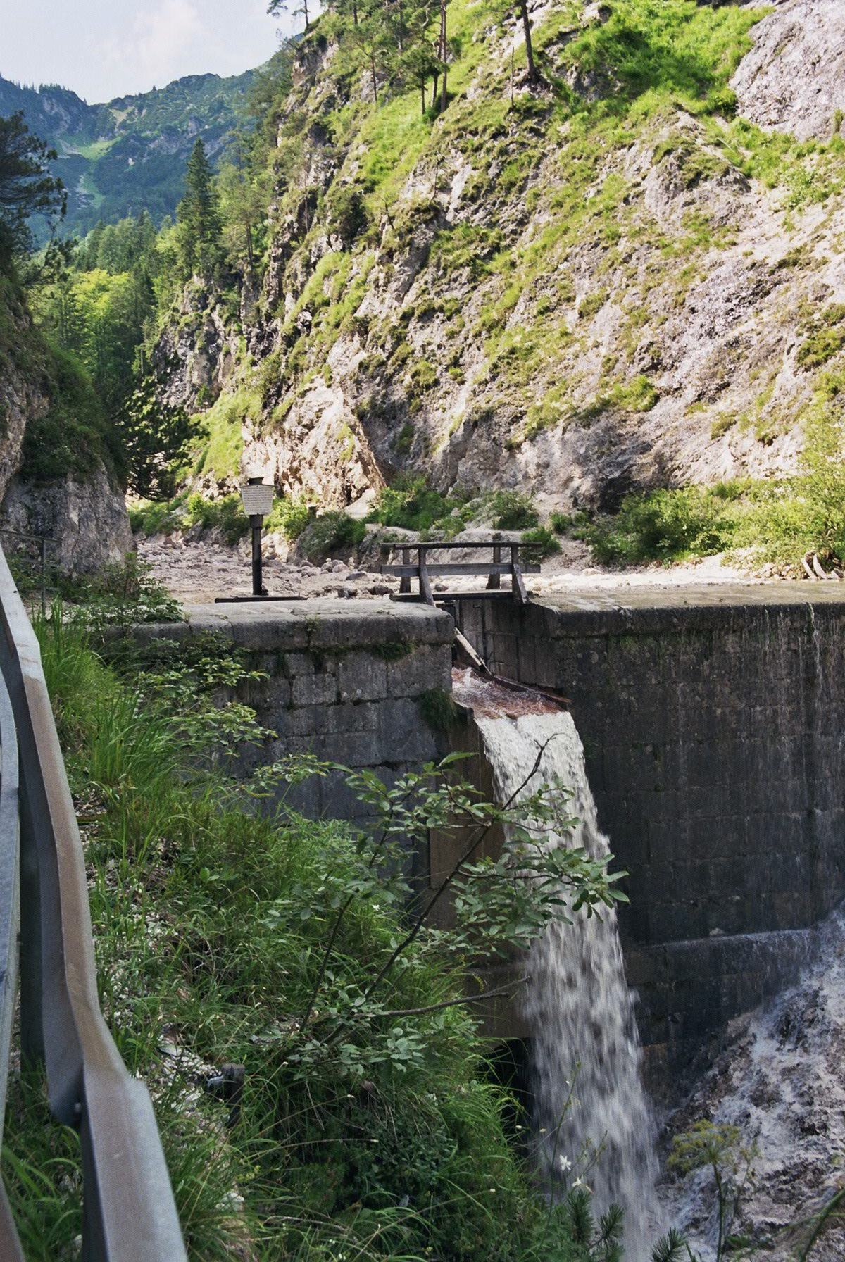 Theresienklause in der Lmbachklamm (nahe Berchtesgaden)